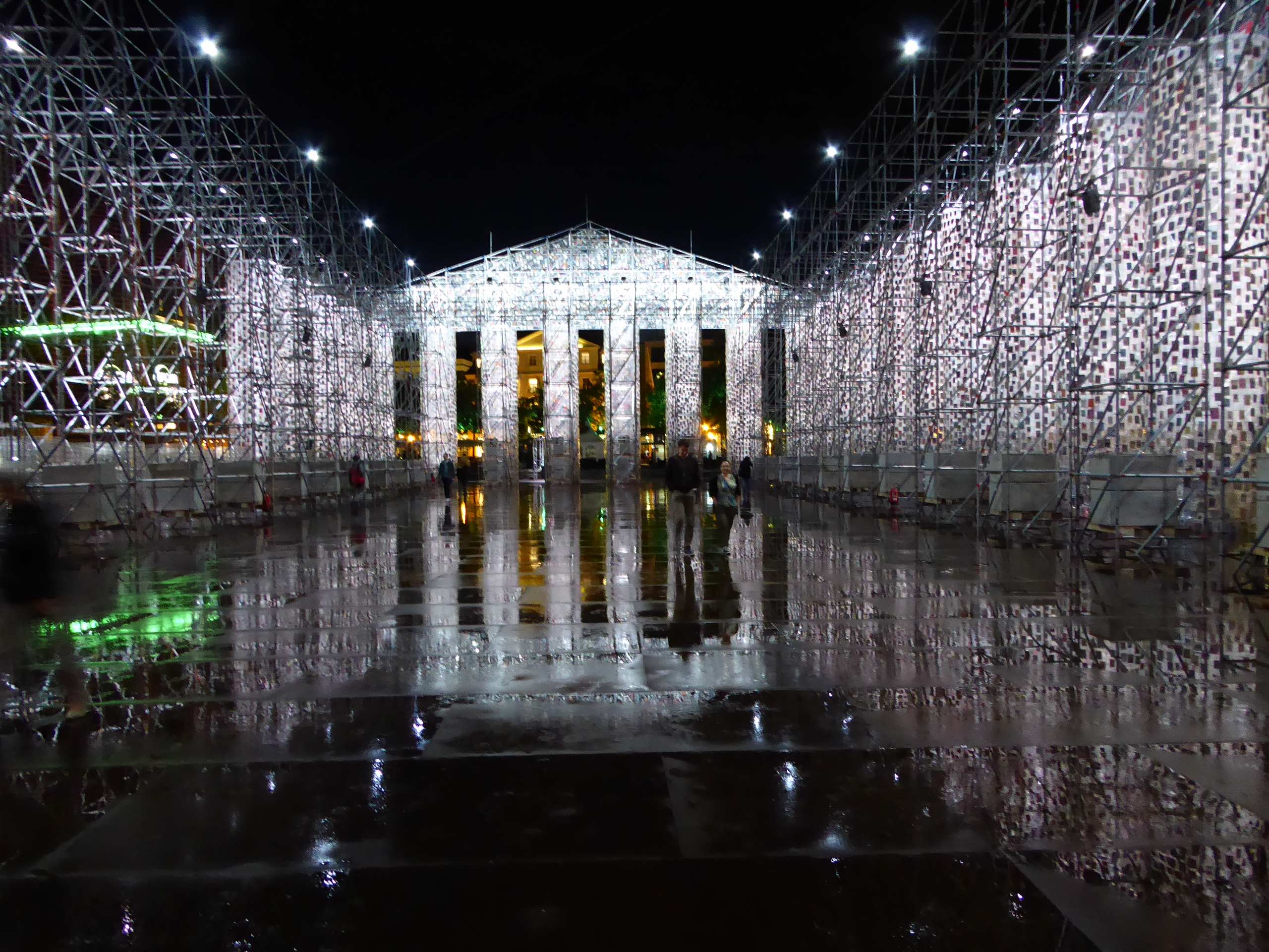 Der Parthenon der Bücher , einer der Hauptkunstwerke der documenta 2017 auf dem Friedrichsplatz in Kassel. Angestrahlt bei Nacht. Innenansicht.